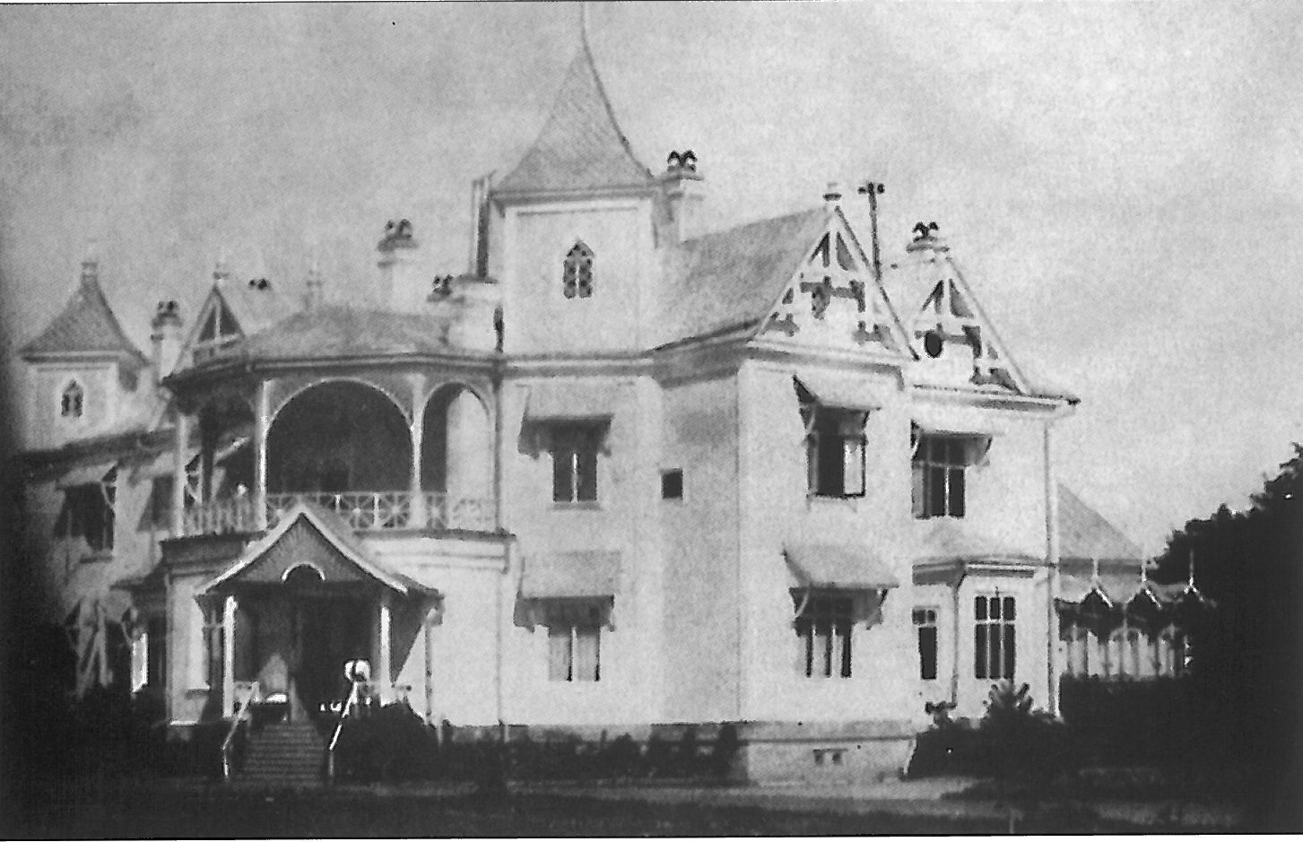 Садибний будинок. Маєток фон Мекк (Копилів)